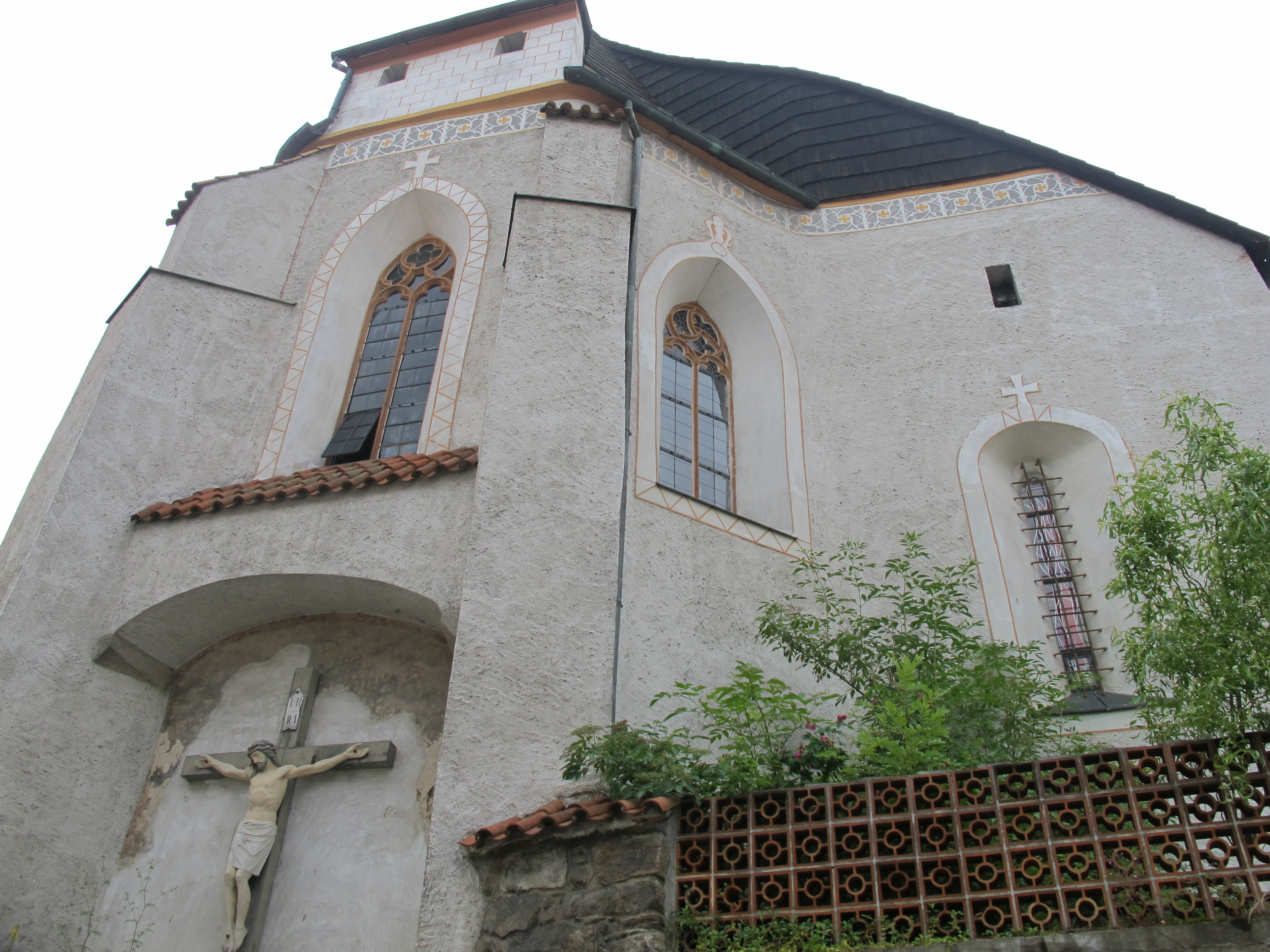 Kostel Navštívení Panny Marie, nám. Svobody, Vimperk.